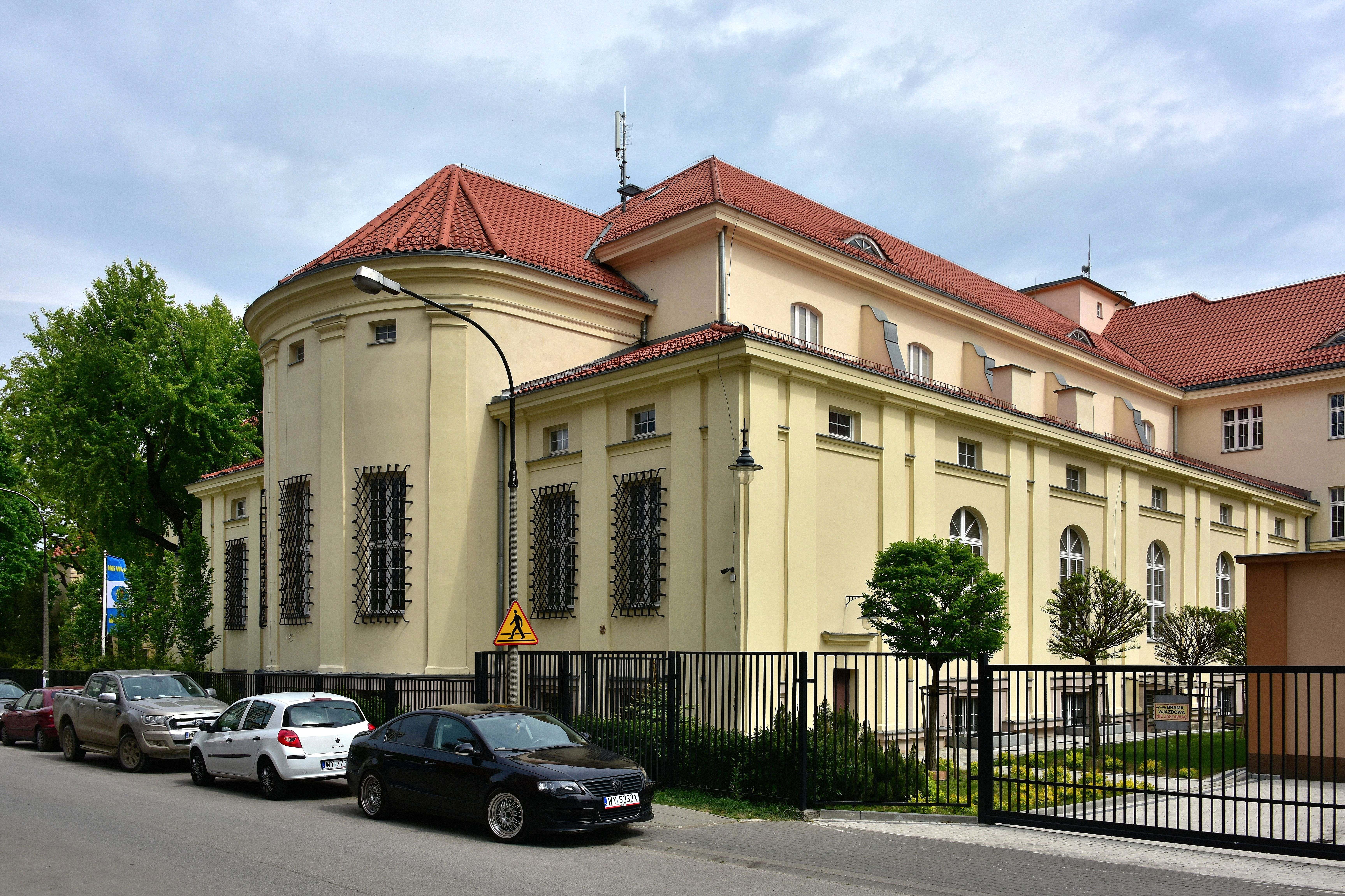 Zachodnia część budynku III LO im. gen. Sowińskiego w Warszawie przy ul. Rogalińskiej 2 zajmowana przesz MOS WOLA